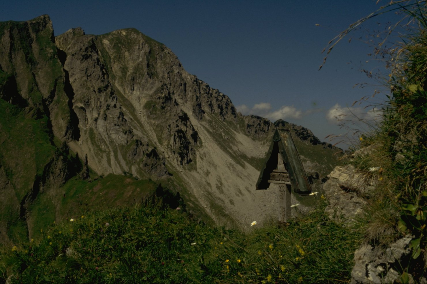 Höfatsnadel von der Stiege